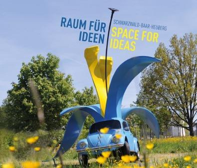 Raum für Idee